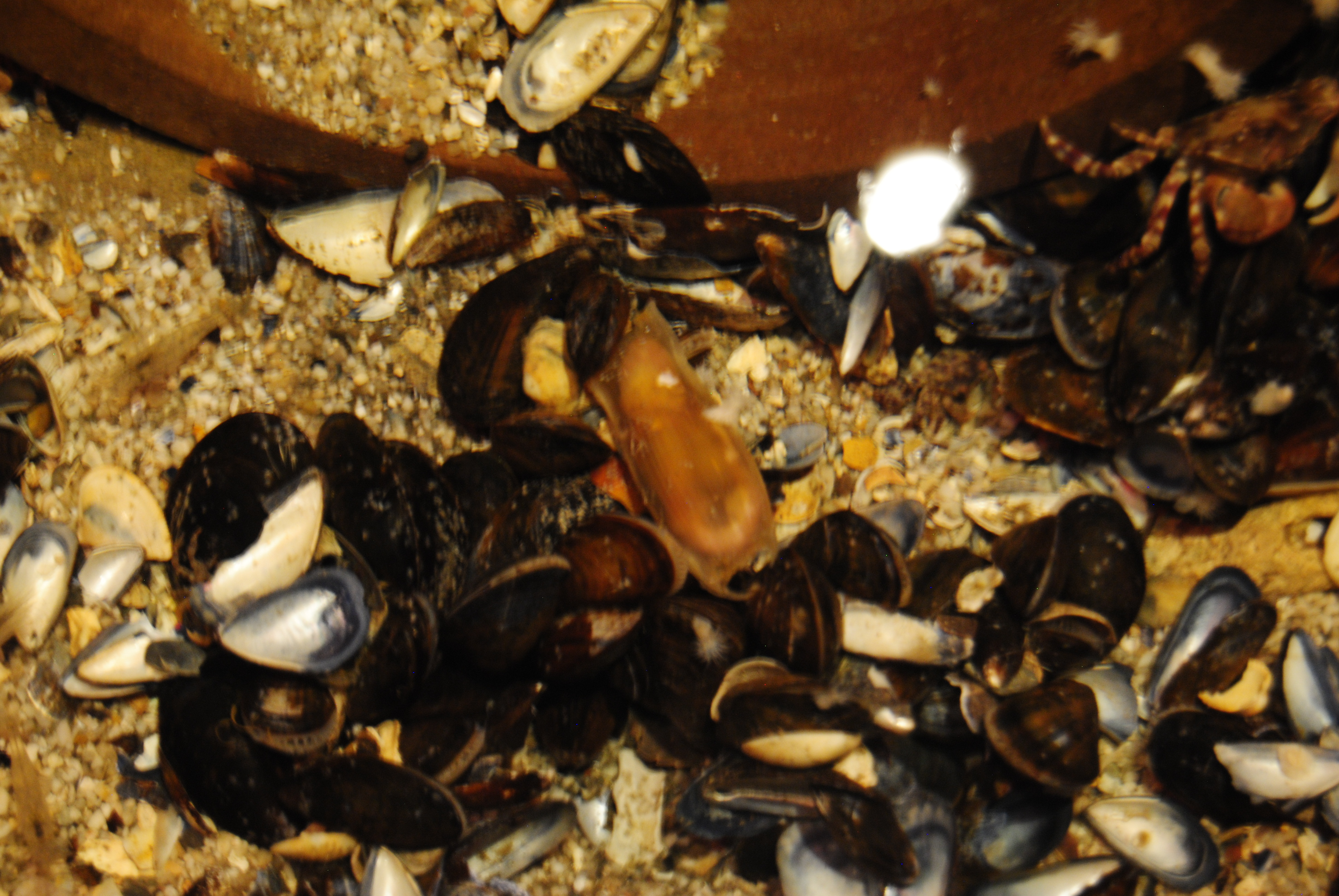 Haaieneis tussen mossels (Noordzee) Onbekende soort